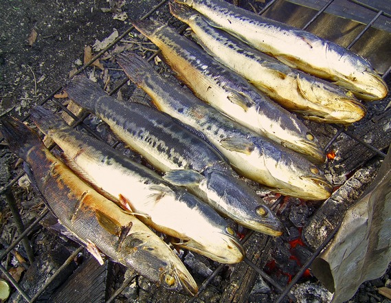 Toman, Channa micropeltes, barbeque. Putussibau, West Kalimantan, Indonesia.